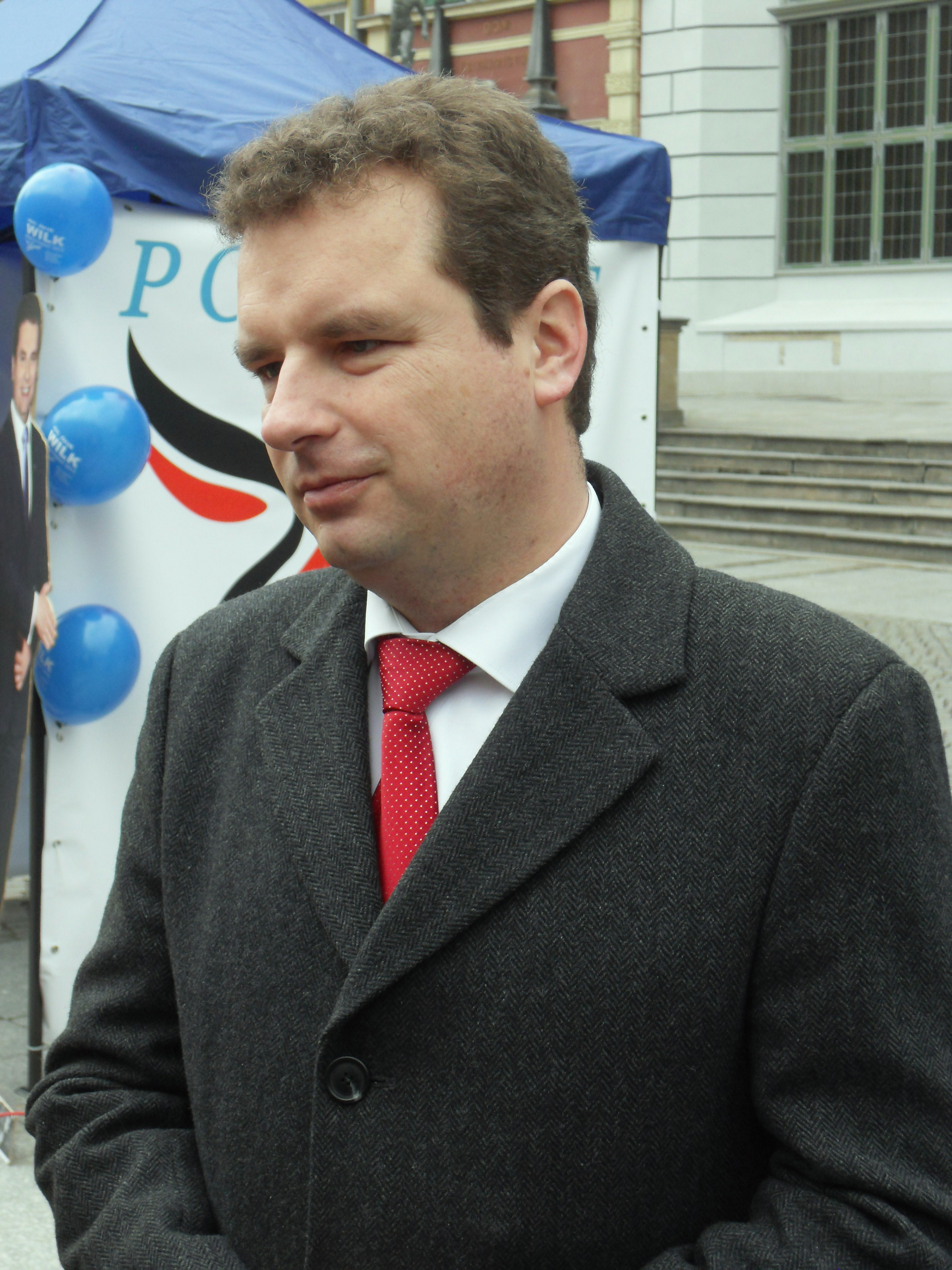 Jacek Wilk (adwokat, ekonomista i polityk) na spotkaniu przedwyborczym (wybory prezydenckie) w Gdańsku.